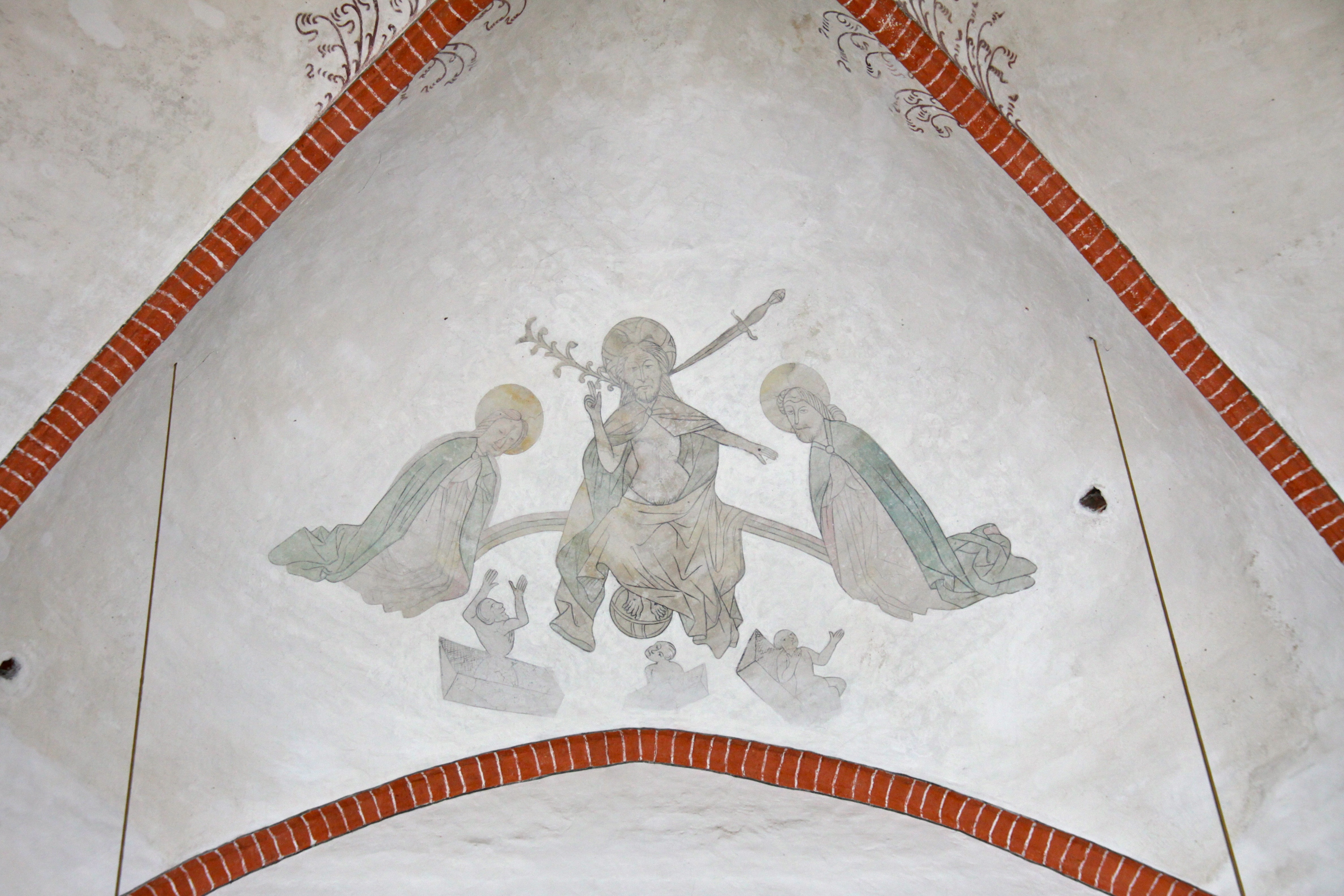 Malerei in der Ludgerikirche